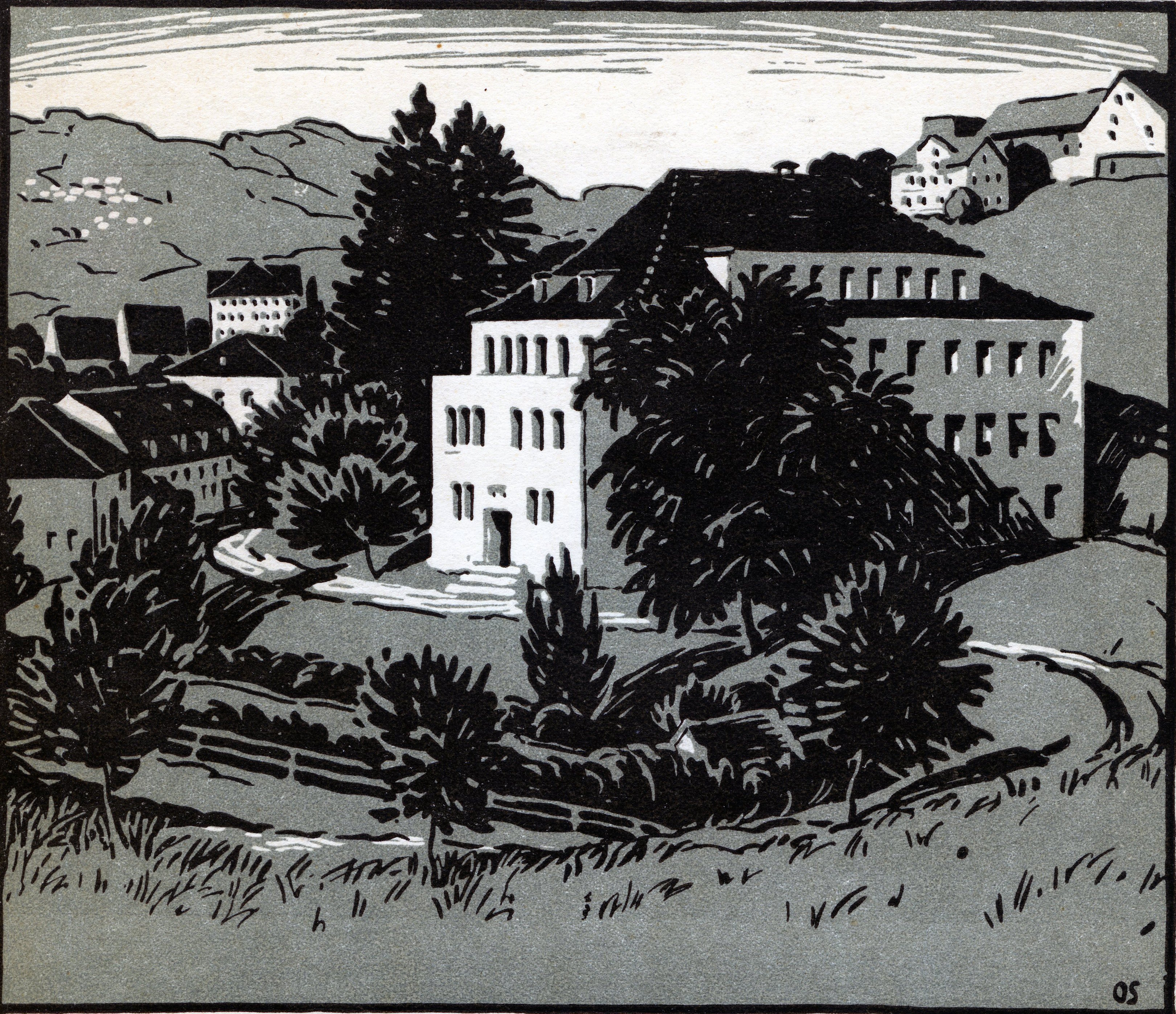 Titelbild der KVT-Mitteilungen Nr. 10 (1931): Rotes Schulhaus. Linolschnitt von Otto Schmid (1889 - 1974)